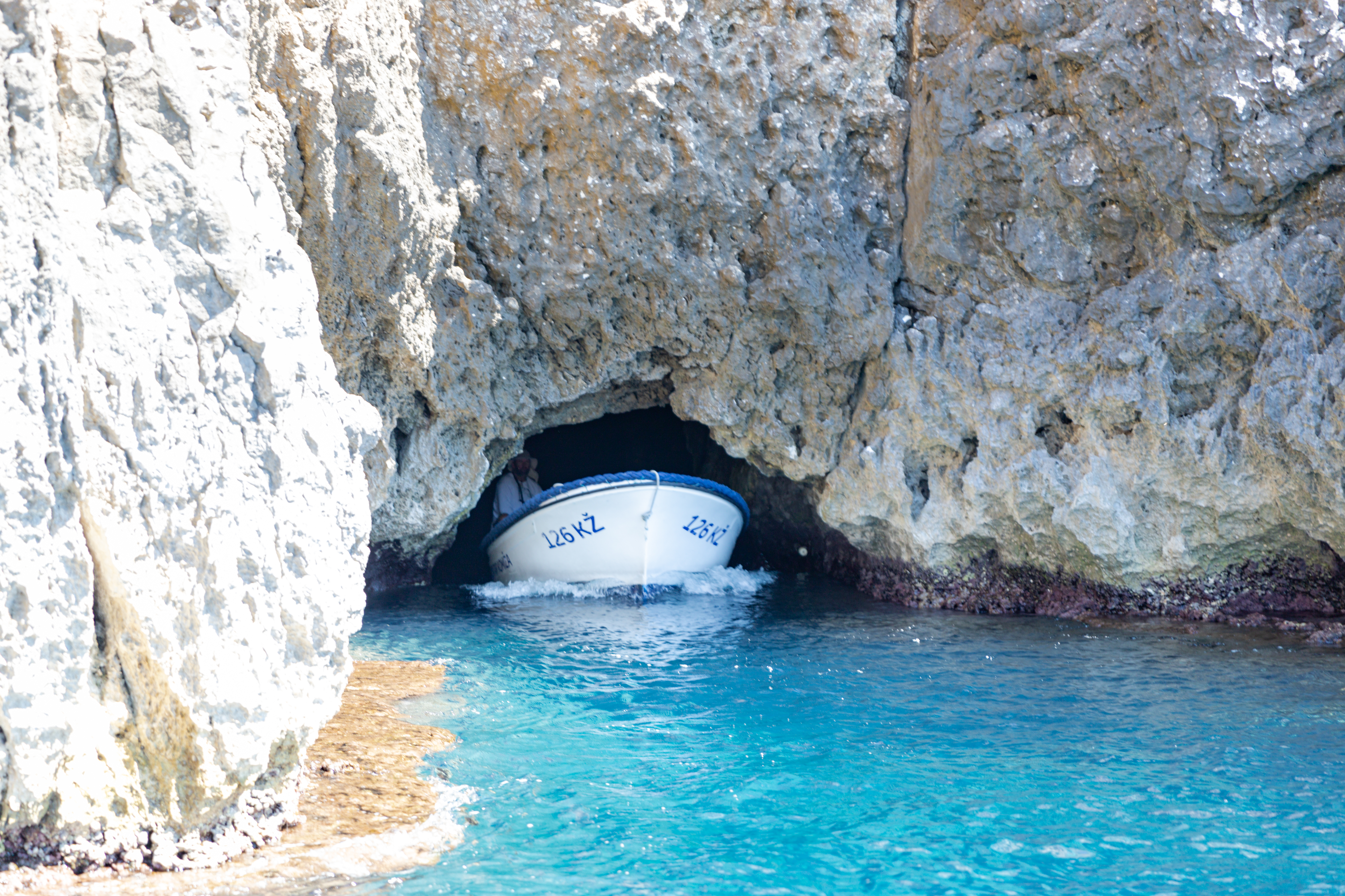 Croatia